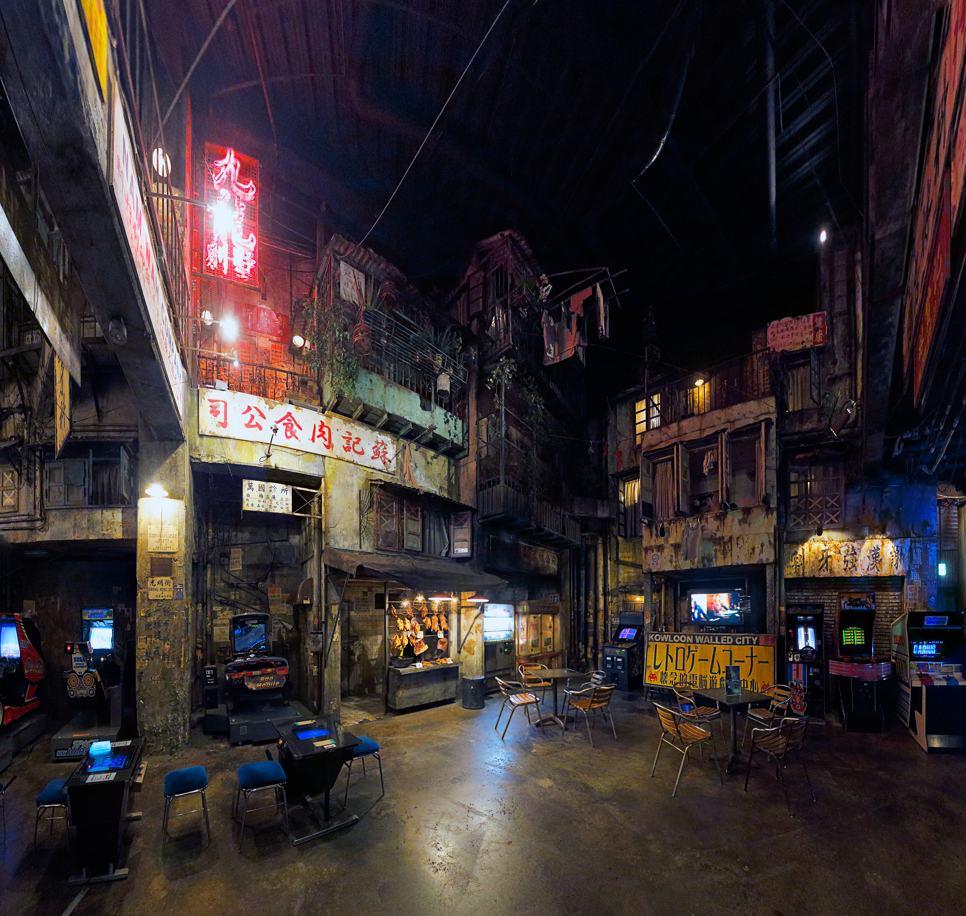 電脳九龍城